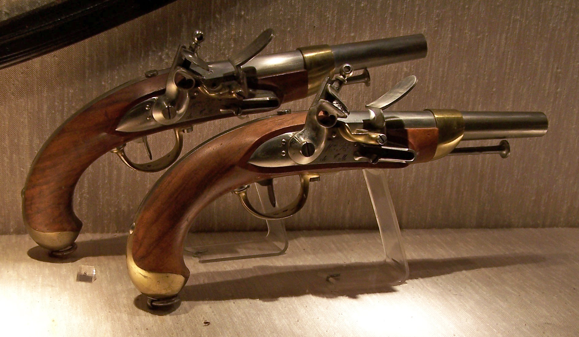 Paire de pistolets de cavalerie, 1816, Musée Paul Dupuy, Toulouse (France)